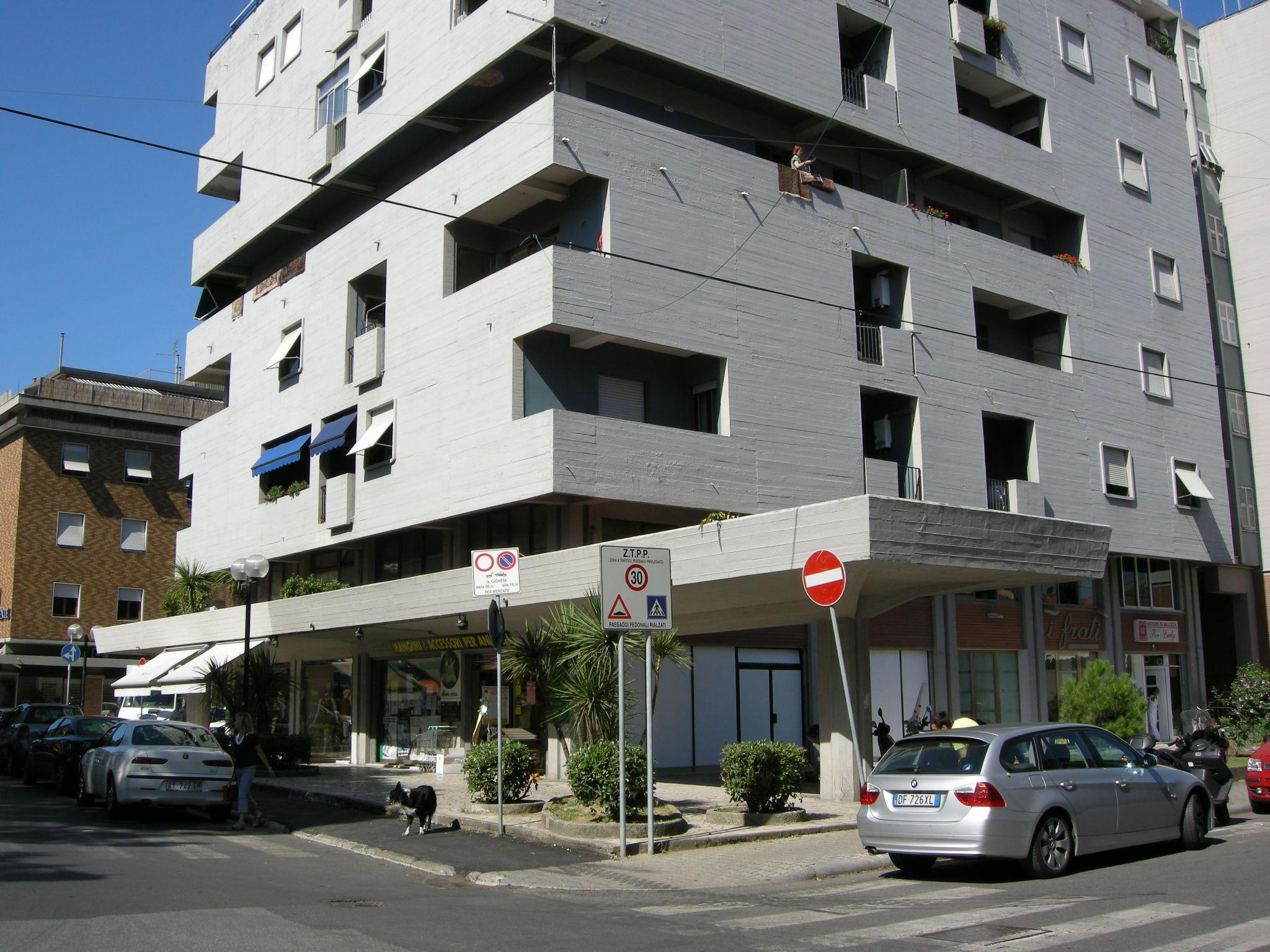 Consominio di via venezia (marina di Carrara)